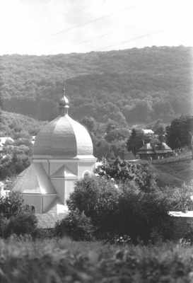 Кліщівна (Рогатинський район Івано-Франківської області). Загальний вид села з 2 церквами.